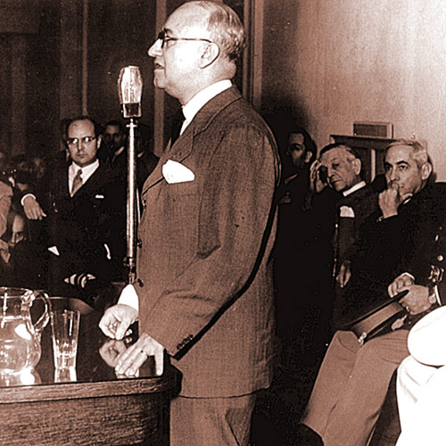 Alberto Rougés asume como rector de la Universidad Nacional de Tucumán. Año 1945.